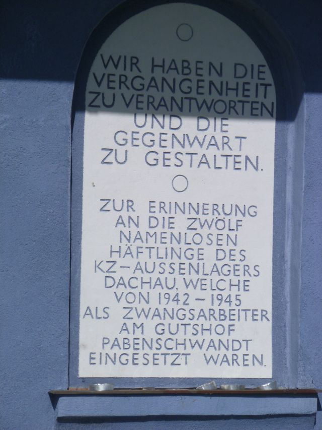 Gedenktafel_Pabenschwand